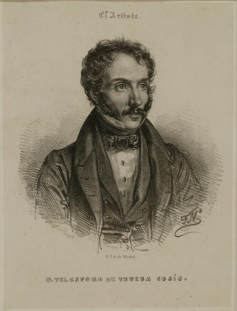 D. Telesforo de Trueba Cosío, litografía de Federico de Madrazo y Kuntz para el tomo II, entrega XXII de El Artista, Madrid, Real Establecimiento Litográfico, 1835. Museo del Romanticismo.